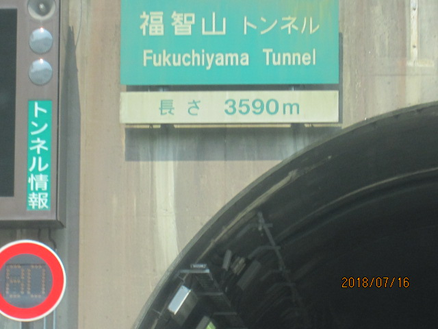 福智山トンネル（下り線）の標識と入口の一部。